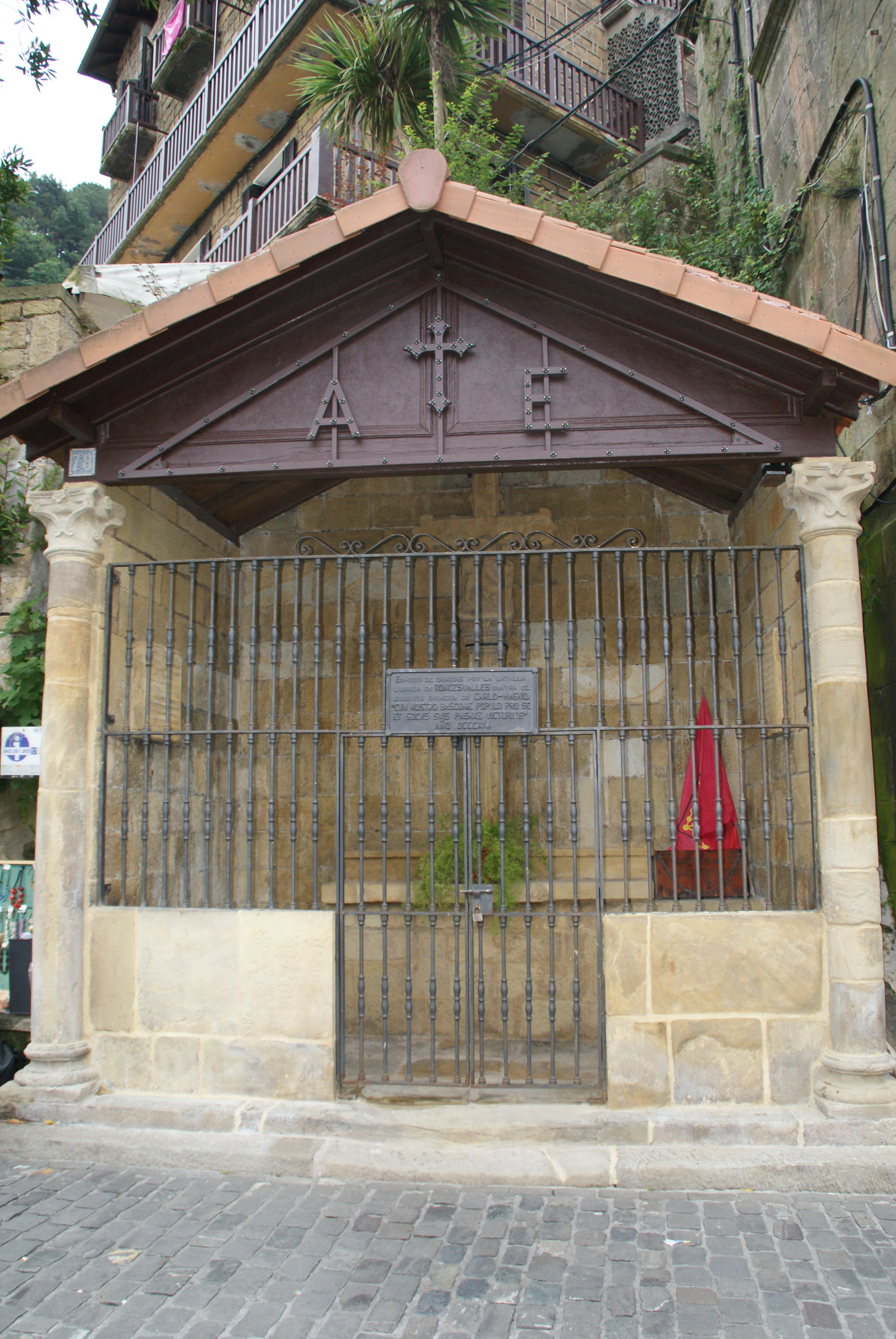 Errukiaren umildegia / Piedadeko santutxoa, Pasai Donibane